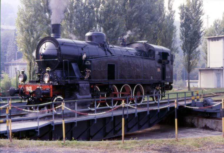 Deposito Locomotive di Vicenza, locomotiva a vapore Gr.940.022 (attualmente in revisione a Mestre); sulla piattaforma girevole.